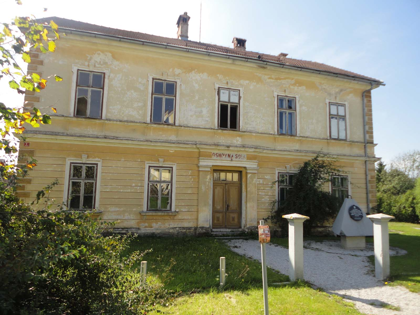 Mozelj pri Kočevju: osnovna šola